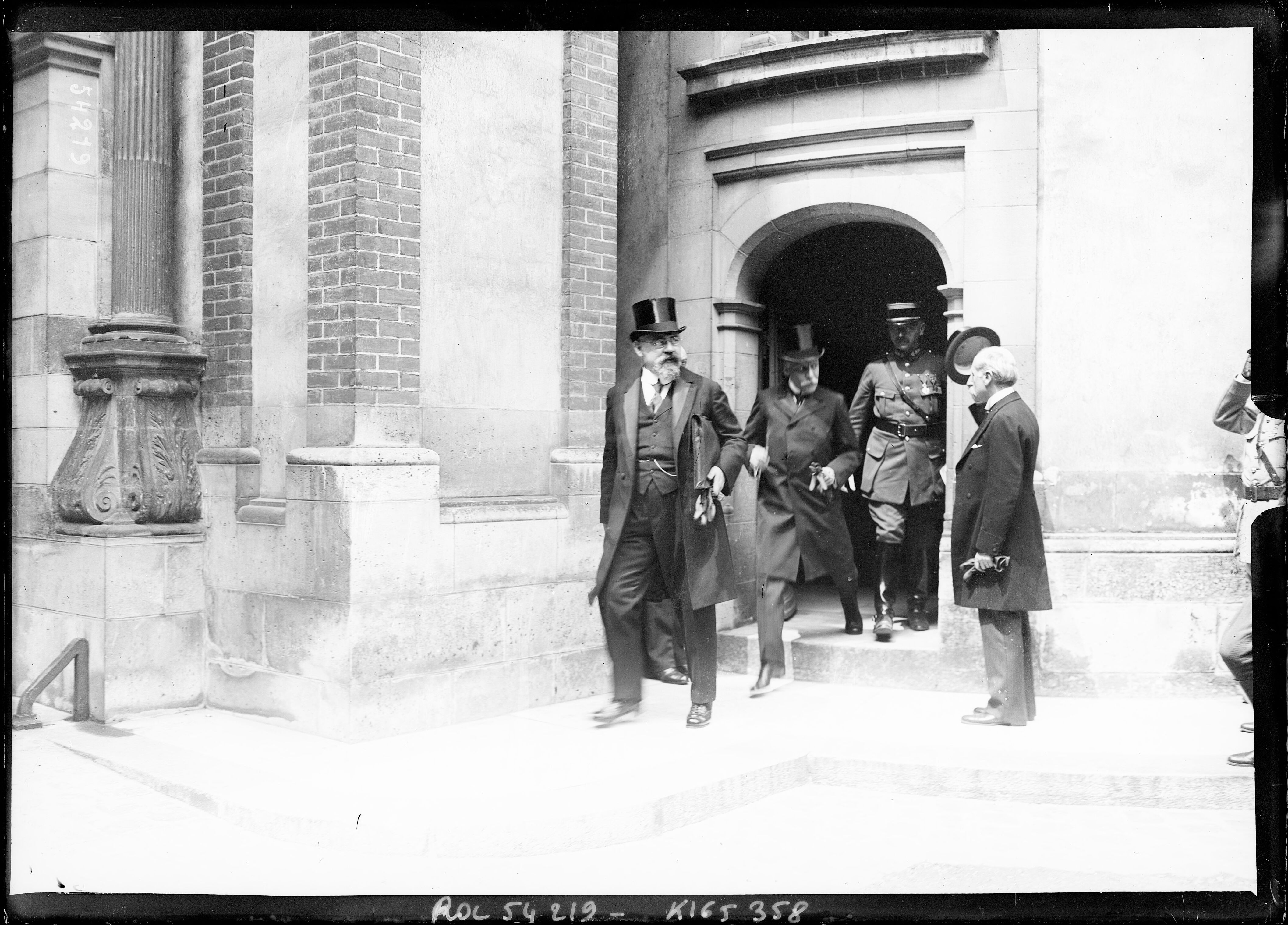 2/6/19, remise du traité de paix aux Autrichiens [préliminaires au traité de Saint-Germain-en-Laye, au château], sortie de Mr Karl Renner.